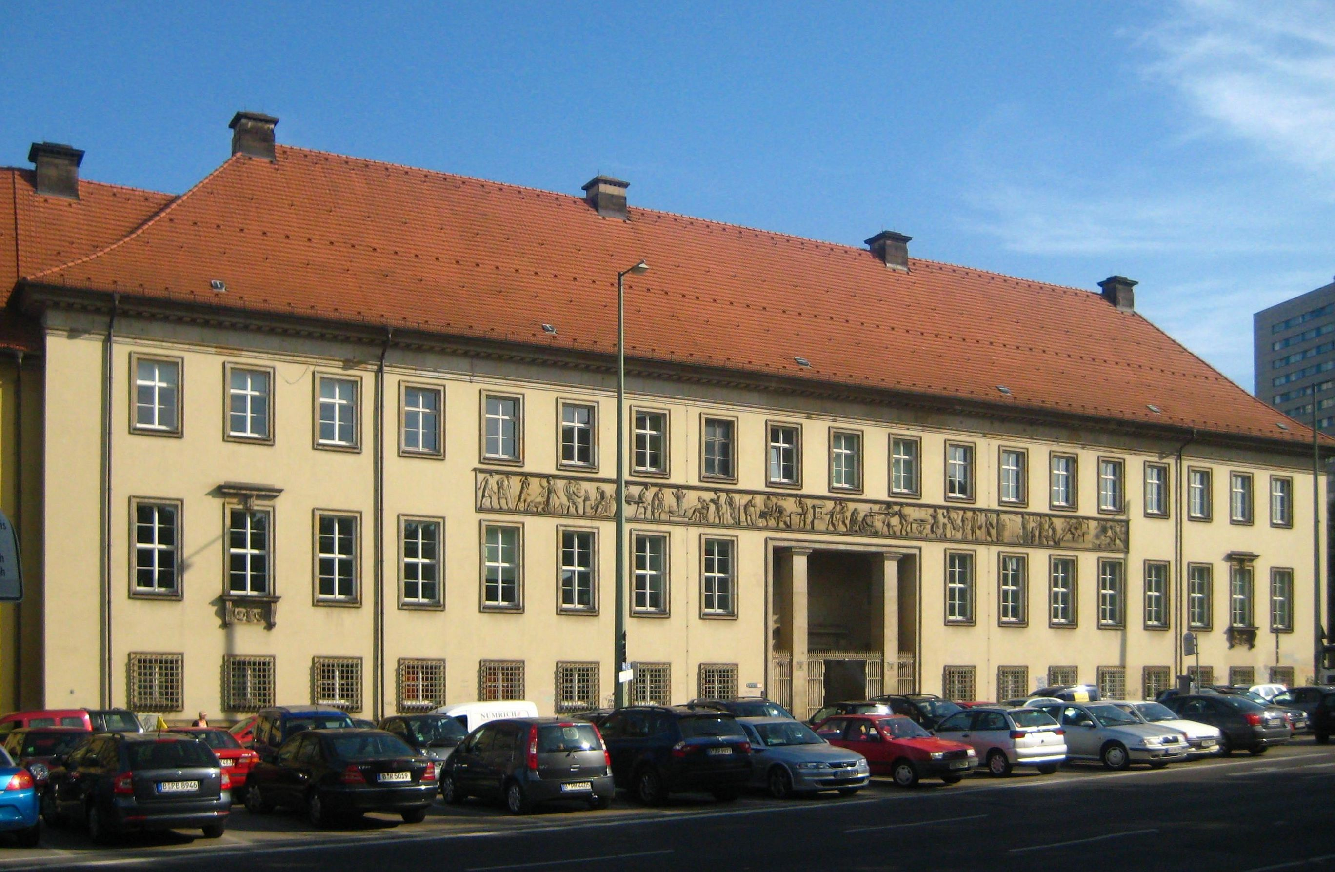 Hauptgebäude der Münze am Molkenmarkt 1-3 in Berlin-Mitte. Der große Komplex der neuen Reichsmünze zwischen Molkenmarkt und Rolandufer entstand 1936-1942 nach einem Entwurf der Architekten Fritz Keibel und Arthur Reck. Es handelte sich um einen der größten Einzelbauten der Nationalsozialisten in Berlin. Das Hauptgebäude für die Verwaltung an Mühlendamm und Rolandufer, ein anschließender Kopfbau für Wohnungen und das versetzte und in den Komplex integrierte barocke Palais Schwerin umschließen einen V-förmigen Innenhof, in dem sich das Fabrikgebäude befindet. Die Fassade am Mühlendamm ist als Putzbau schlicht gehalten. Eine Wandöffnung mit eingestellten Stützen dient als Portal. Der Wandschmuck besteht aus einer Kopie des bedeutenden Münzfrieses von Friedrich Gilly und Johann Gottfried Schadow von der alten Münze am Werderschen Markt. In der DDR-Zeit wurde der Komplex als Prägestätte, von der Staatlichen Kunstkommission und vom Kulturministerium genutzt. Nach 1990 wurde der Komplex weiter von der Staatlichen Münze Berlin verwendet, bis diese 2005 nach Reinickendorf umzog. Der gesamte Komplex steht als Baudenkmal unter Denkmalschutz.